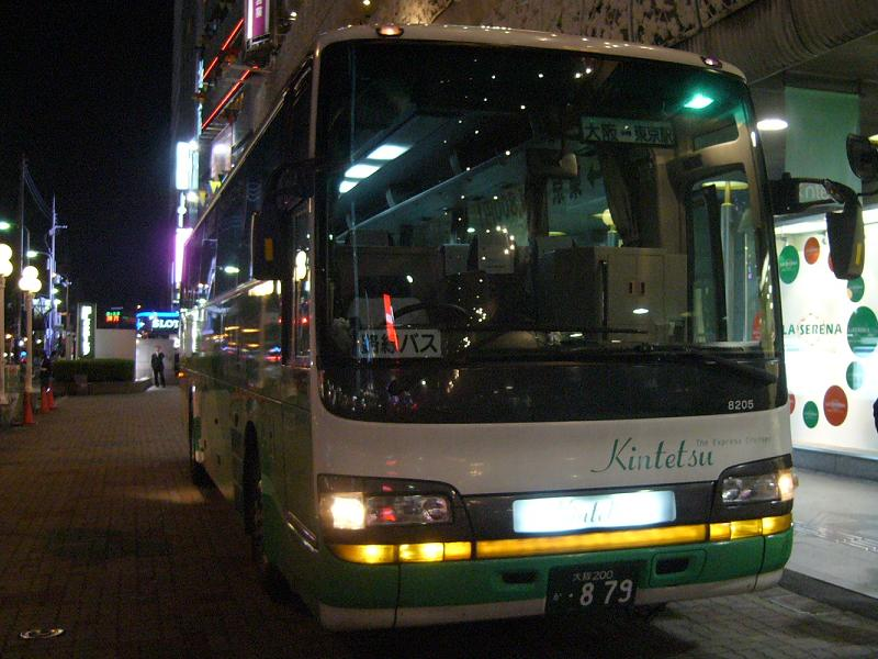 登録番号 大阪200か・879 近鉄バス所属 車番8205 フライングスニーカー号用 2007年4月23日 あべの橋バスステーションにて撮影